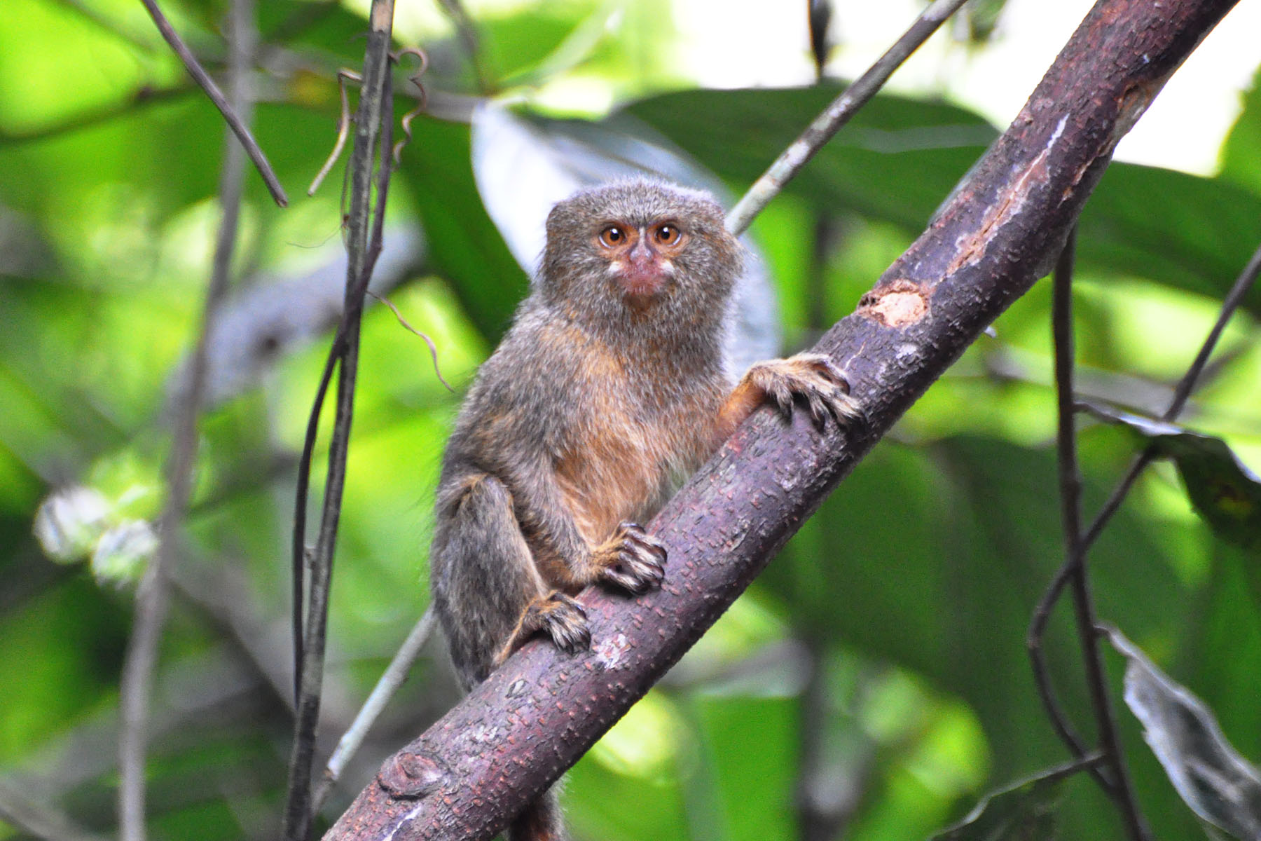 21-Sep-10 Sacha Lodge, Ecuador